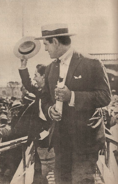 El boxeador Luis Angel Firpo parte hacia los Estados Unidos, el 10 de febrero de 1923, para enfrentar a Bill Brennan.